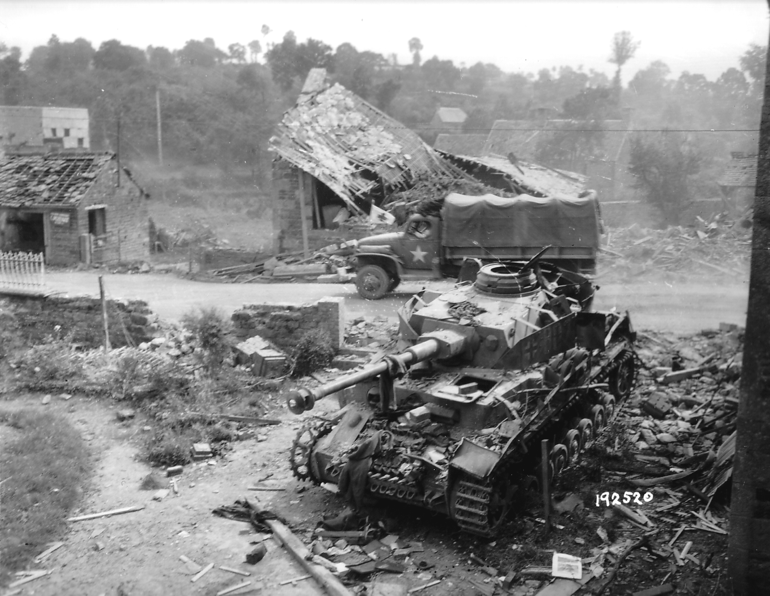 Bataille de Normandie : été 1944 : Dans un village passe un GMC derrière un panzer détruit.